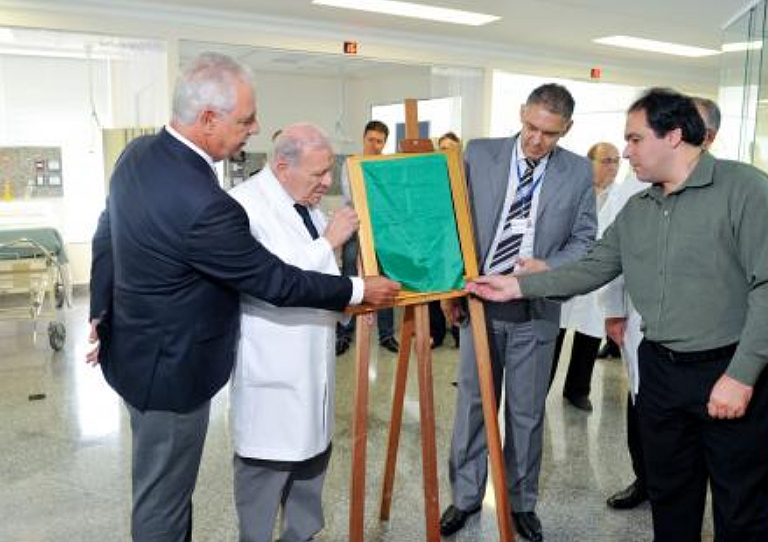 Secretário Estadual da Saúde, Ciro Simoni, Diretor do Instituto de Cardiologia, Dr. Ivo Nesralla, Secretário Adjunto Municipal de Saúde, Jorge Cuty, e Presidente da CMPA, Dr. Thiago Duarte, participam da inauguração da nova UTI do Instituto de Cardiologia